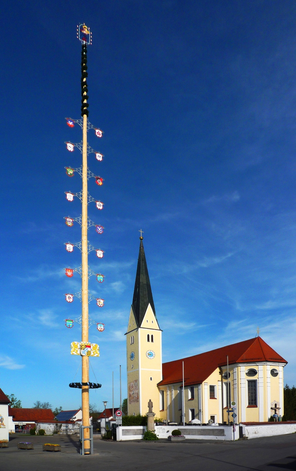 Maibaum der Paartaler Dirndl und Burschn in Waidhofen am Kirchplatz